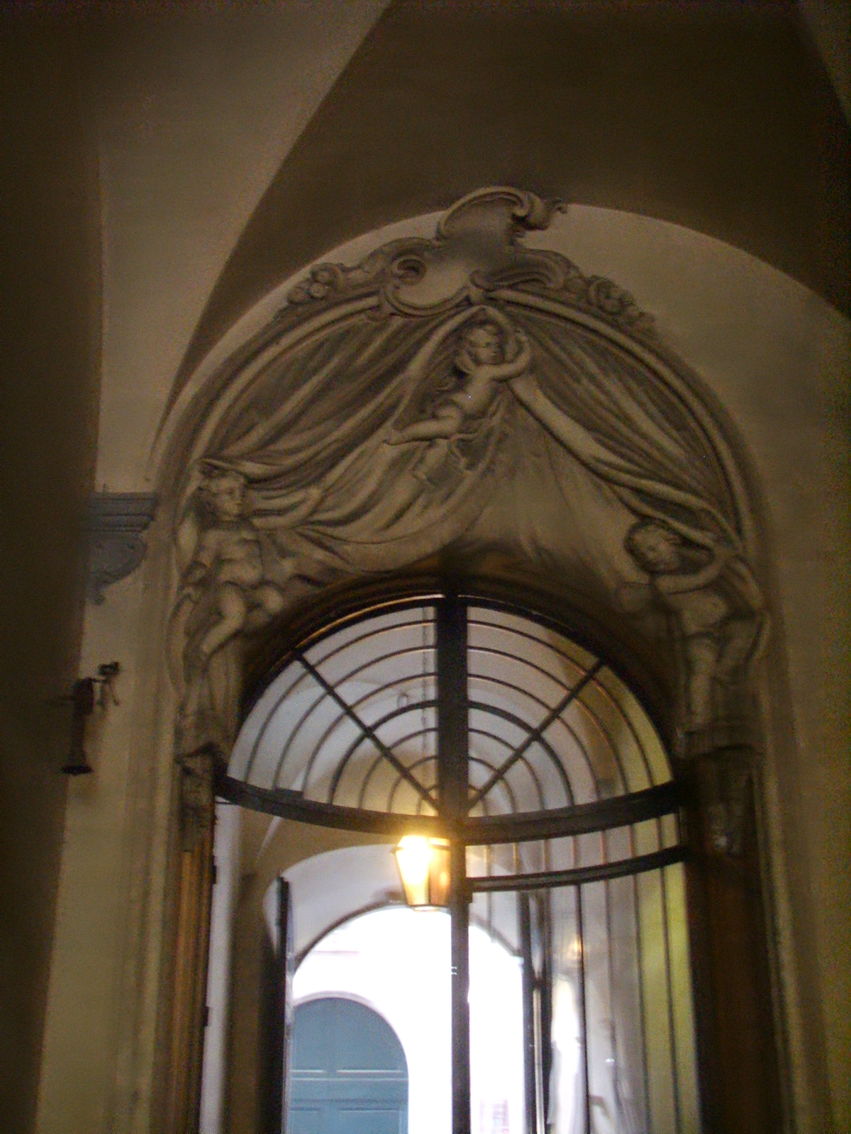 Palazzo degli alessandri stucchi